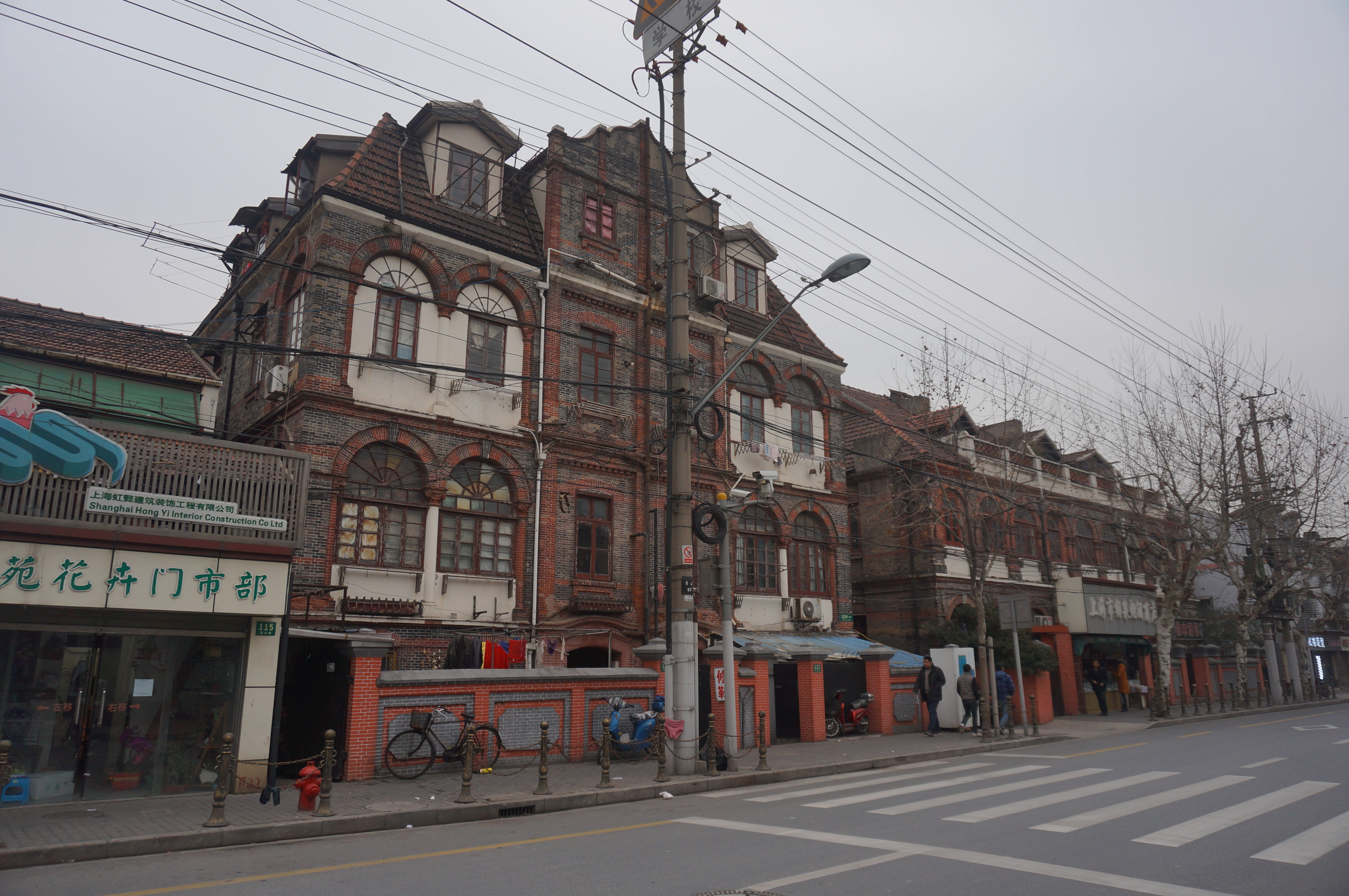 中文（中国大陆）: 上海霍山路119-121号